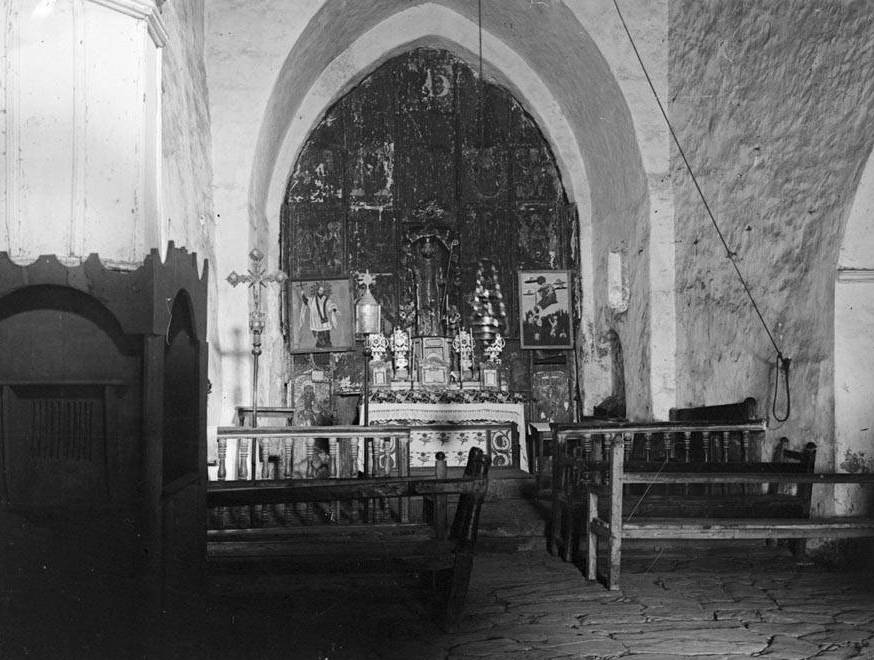 Imatge